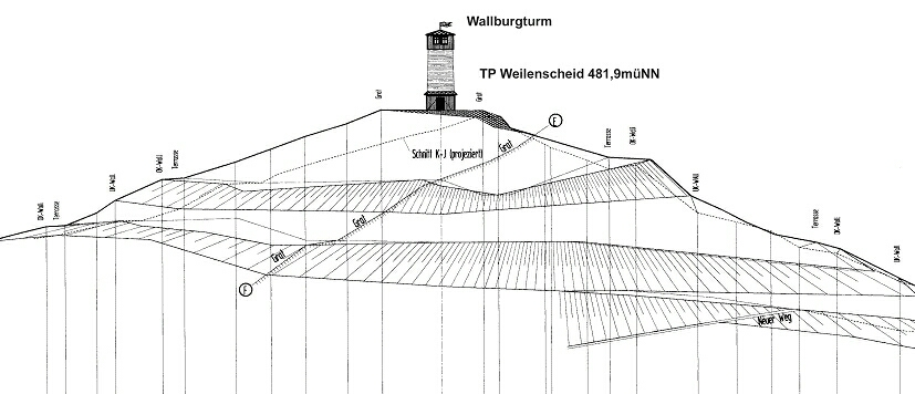 Querschnitt durch den Weilenscheid mit Darstellung der umlaufenden Ringwälle